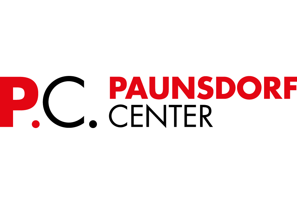 Logo Paunsdorf Center Leipzig